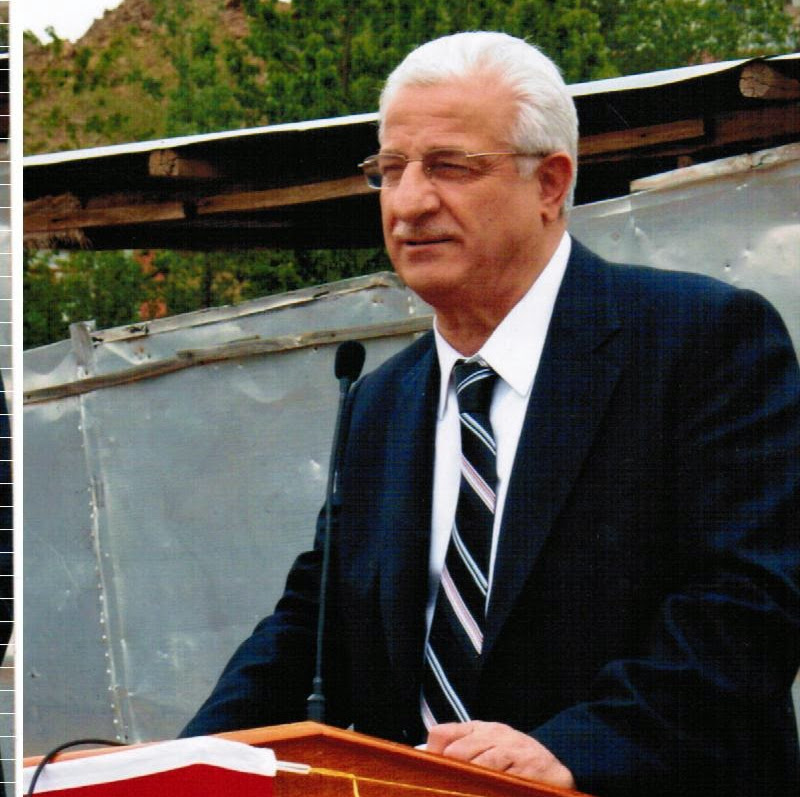 Kürsüde konuşma yaparken